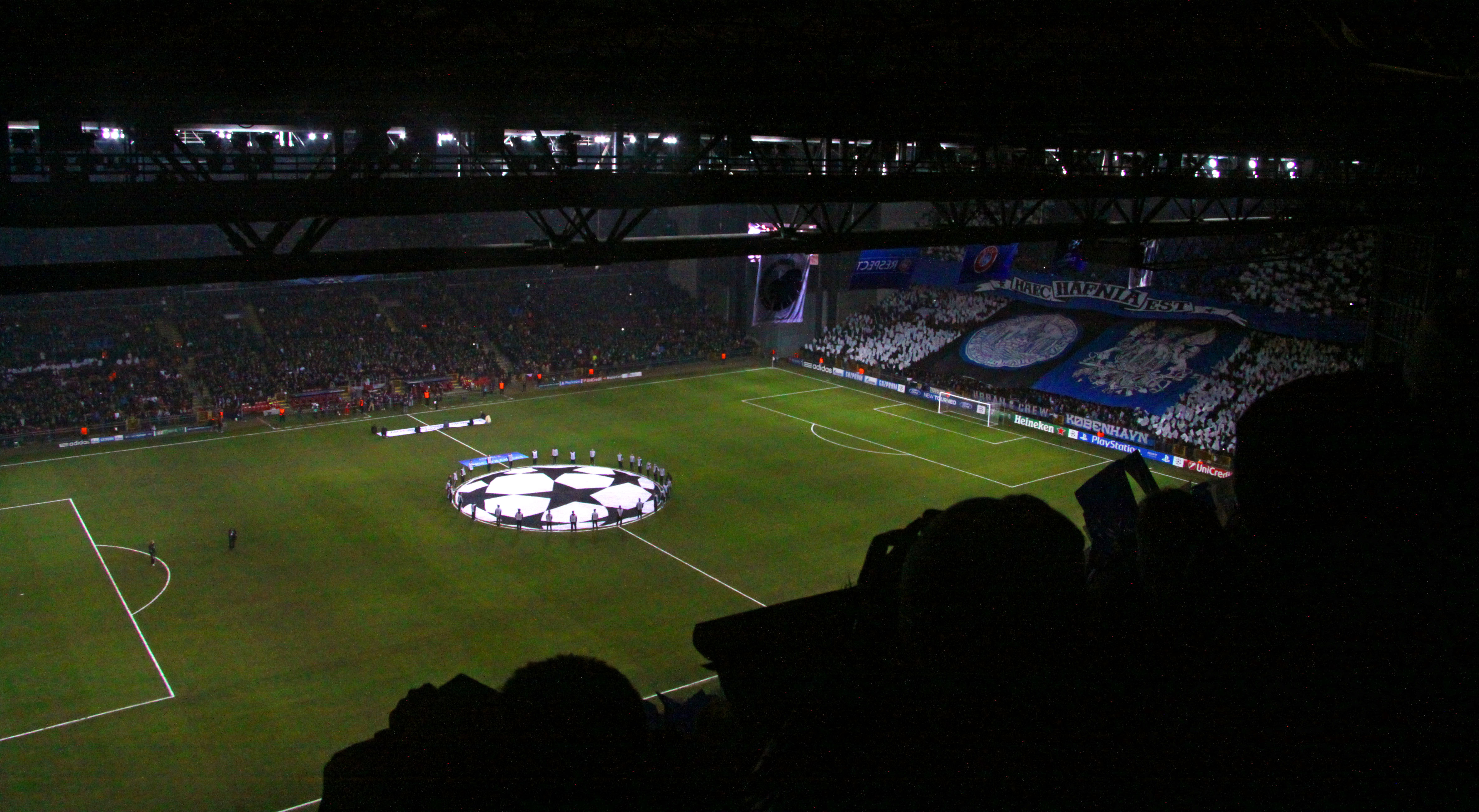 København / Copenhagen. FC København - Real Madrid i Champions League.